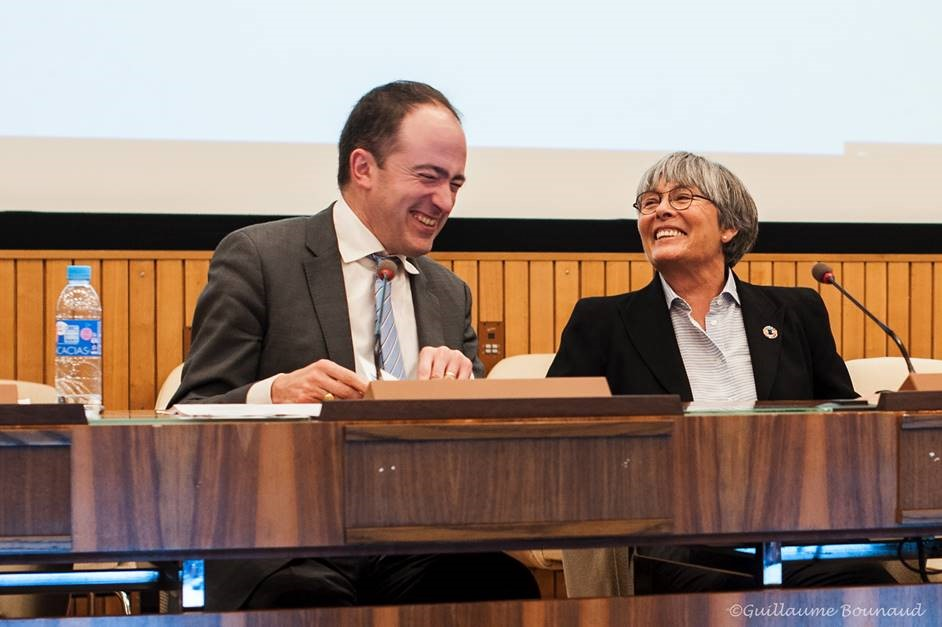 UNESCO Ocean and Climate Alliance - conférence internationale de lancement - Eric BANEL et Françoise Gail